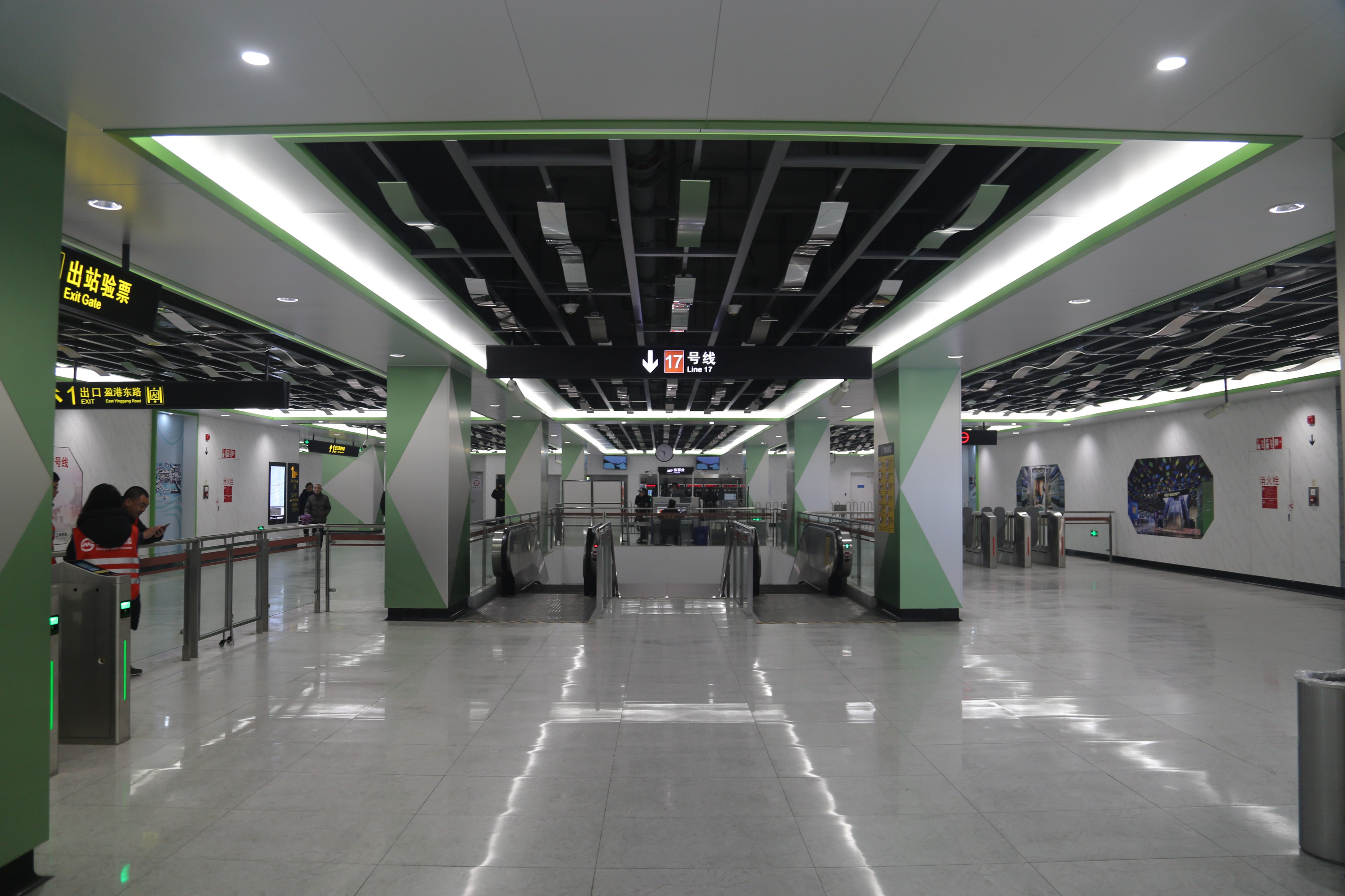 青浦新城站站厅